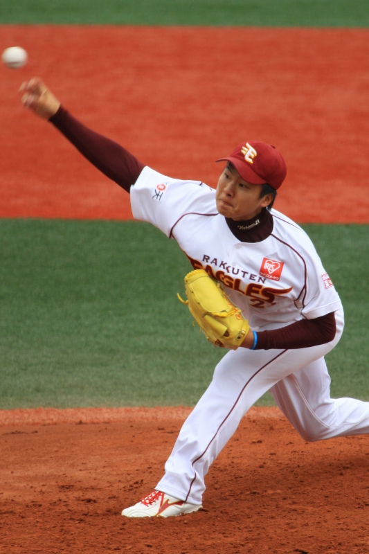 日本プロ野球 東北楽天ゴールデンイーグルス 釜田佳直投手